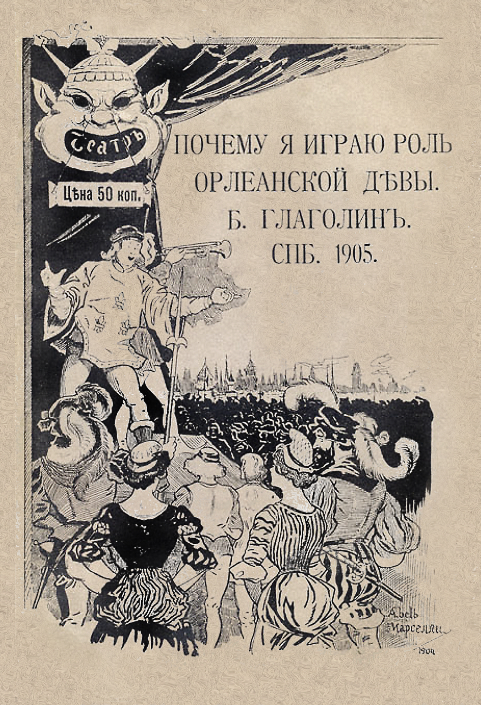 Обложка книги Б. Глаголина "Почему я играю роль Орлеанской девы"